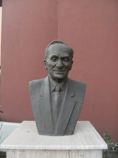 Rıdvan Ege'nin Ufuk Üniversitesi Dr.Rıdvan Ege Hastanesi önündeki büstü